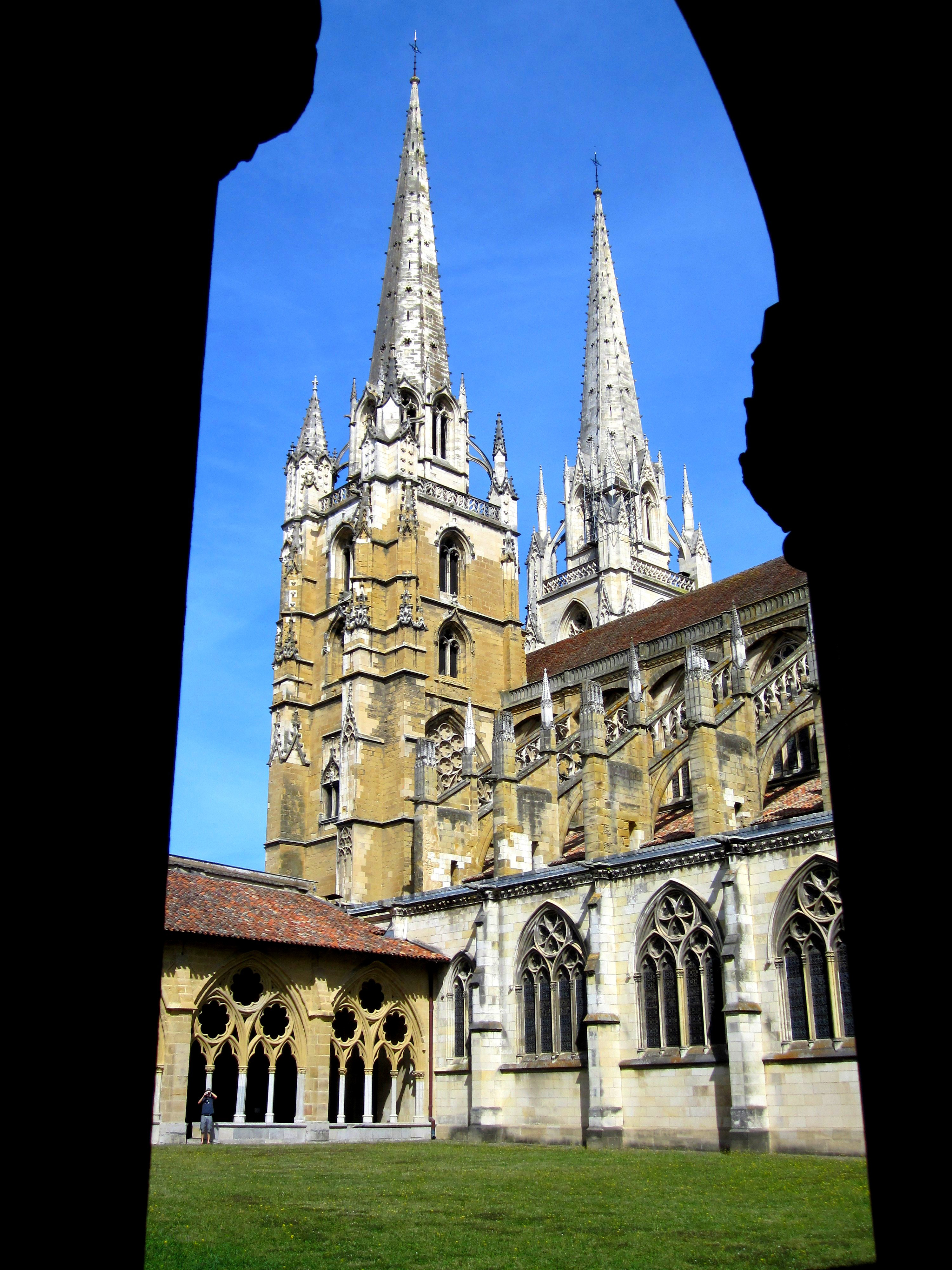 Cathédrale de Bayonne